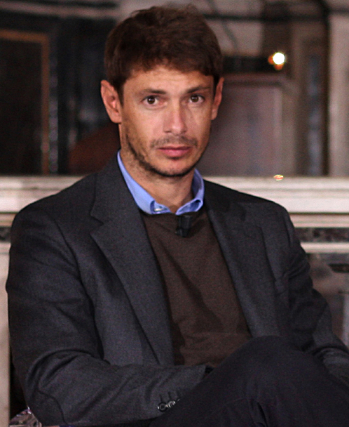 Giorgio Pasotti - Foto di G. M. Ireneo Alessi (Sinix Lab)